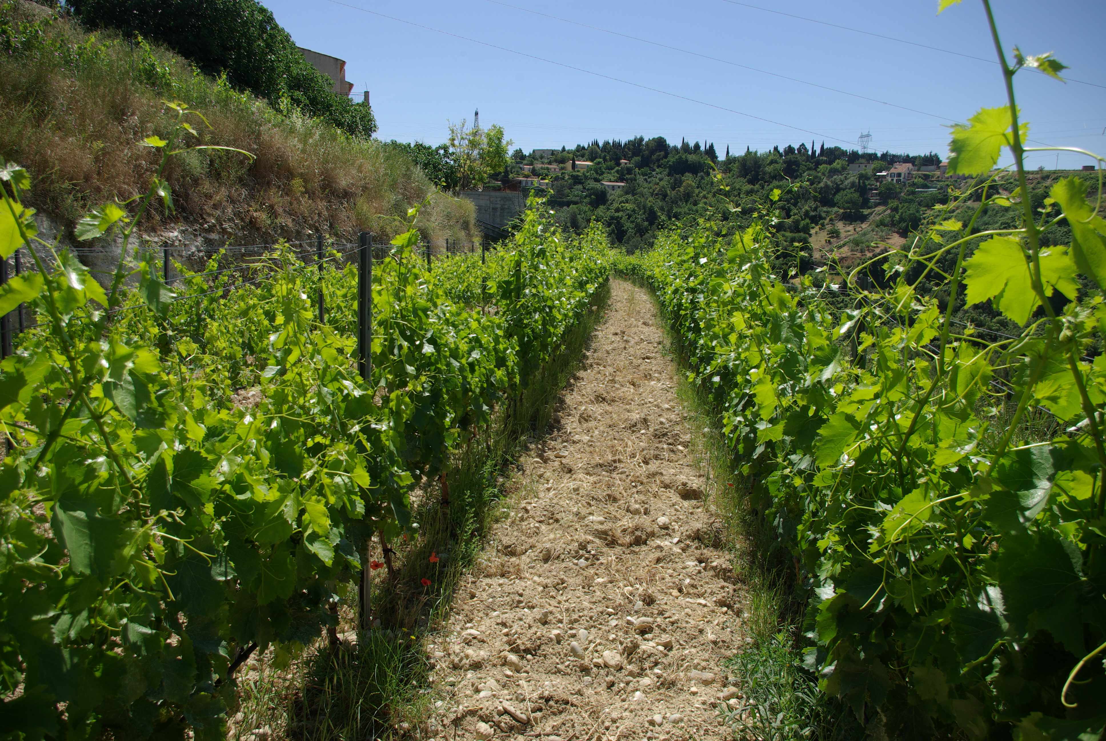 Bellet vinyard, Domaine Saint Jean